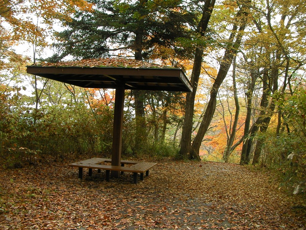 紫山公園 東屋